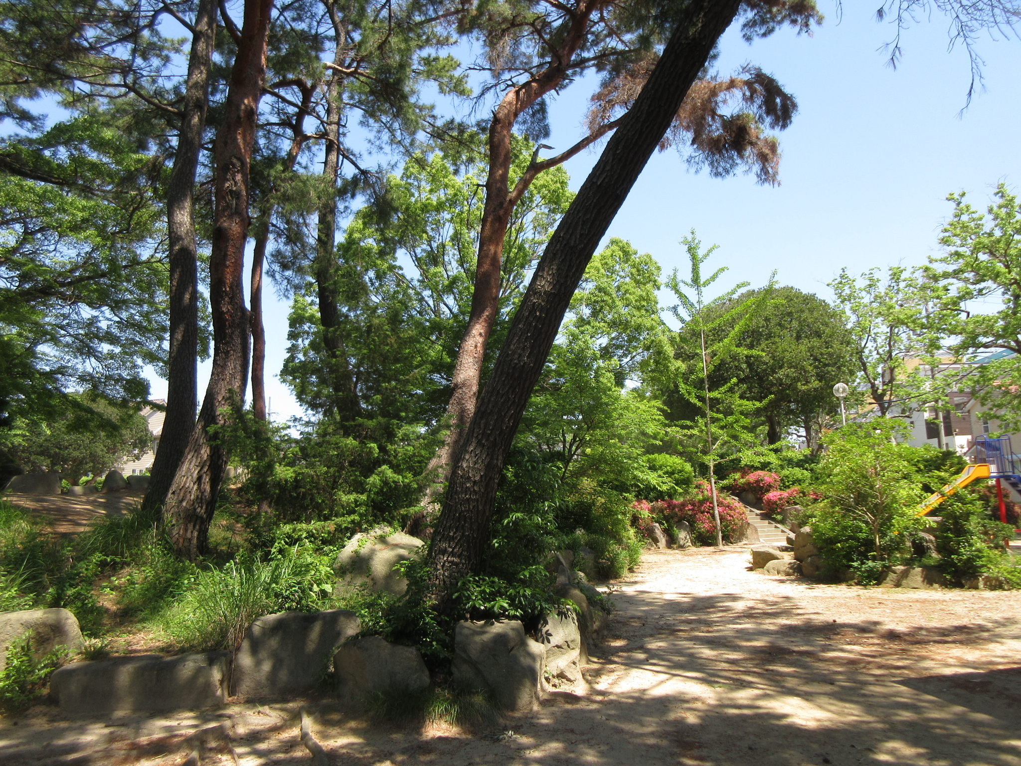 若松公園（岡崎市若松東）